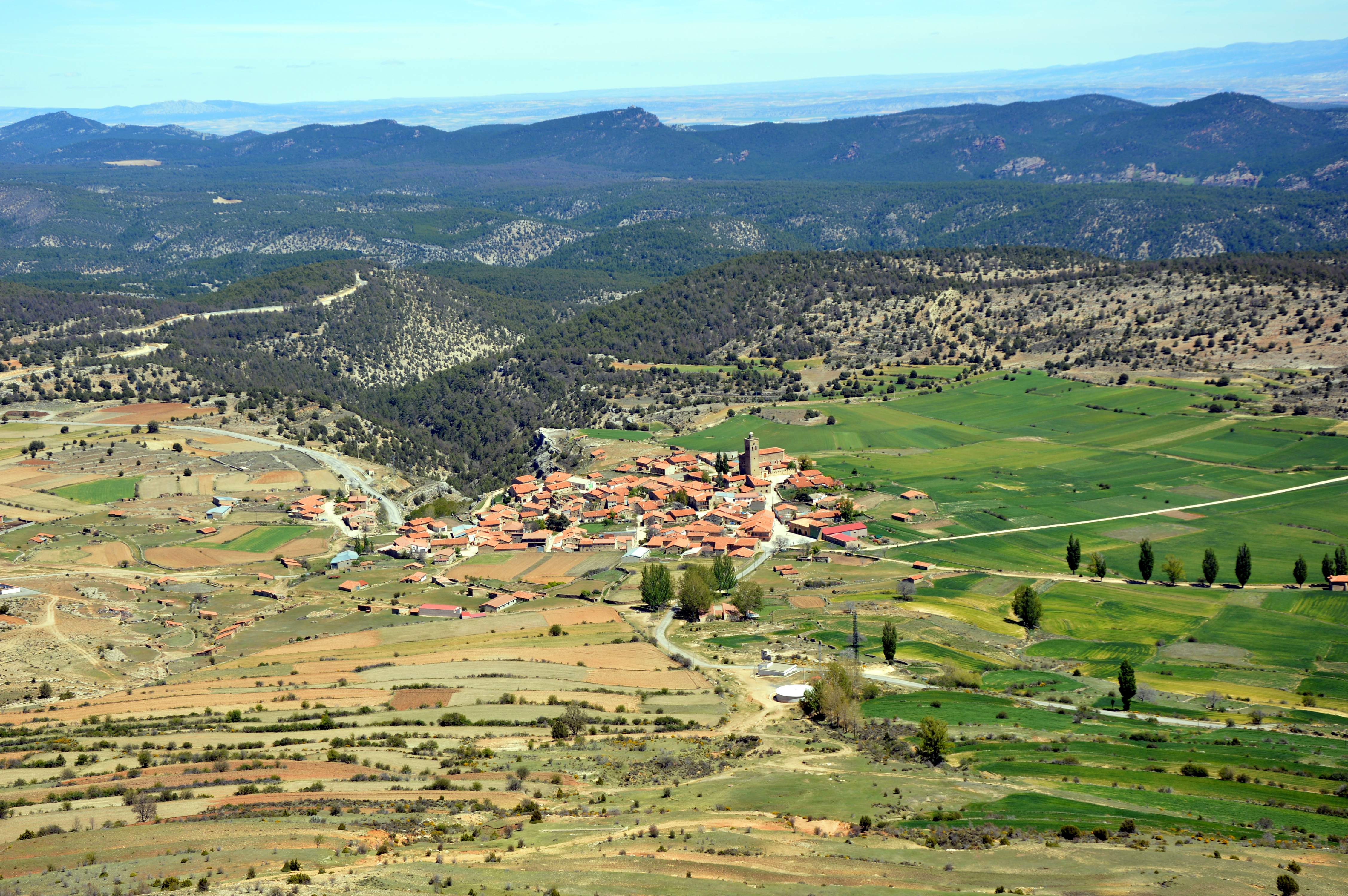 Vista general (meridional) de Jabaloyas (Teruel), desde el cerro Javalón (2017).